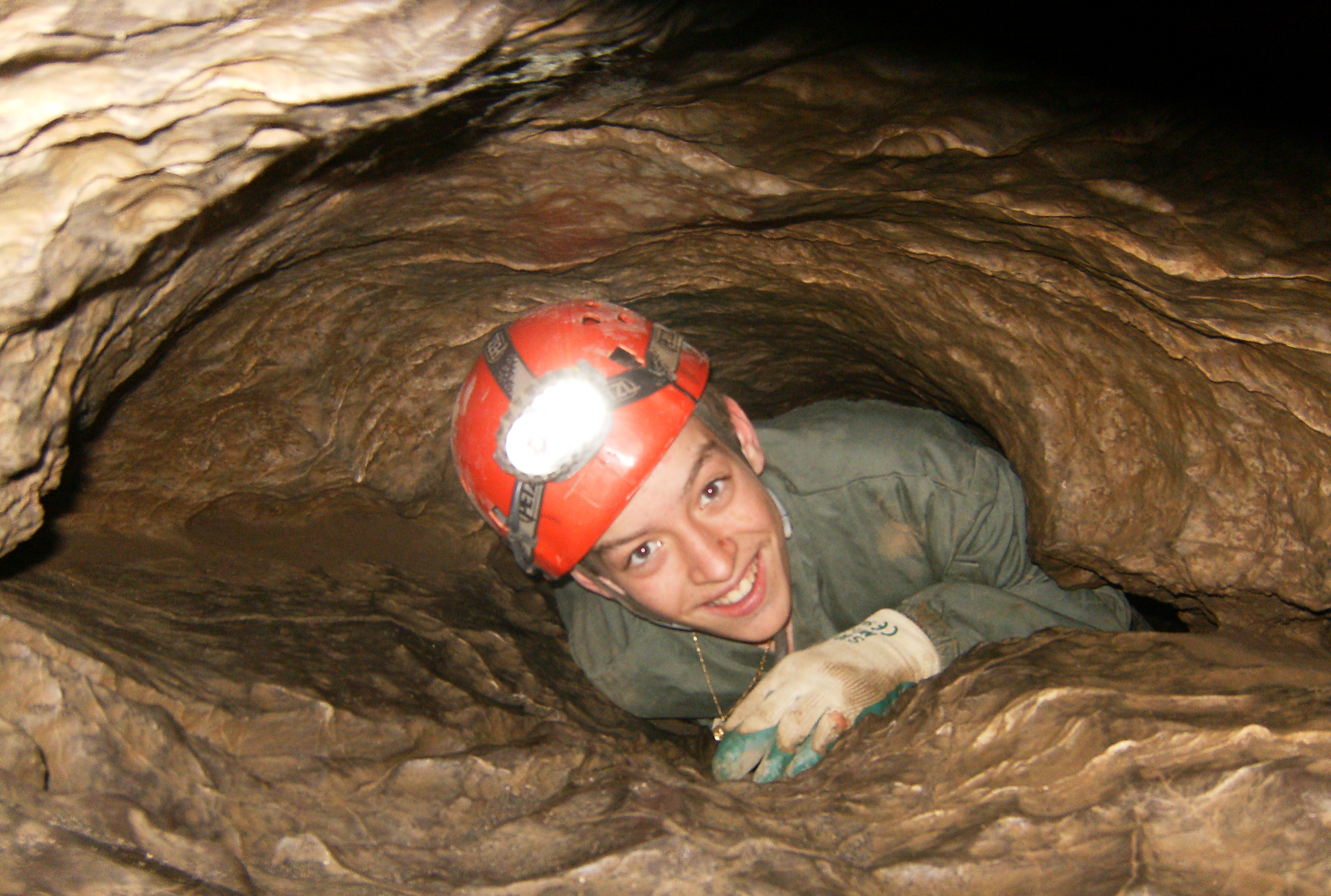 Ein Hölloch-Besucher im sogenannten Nirvana- Test